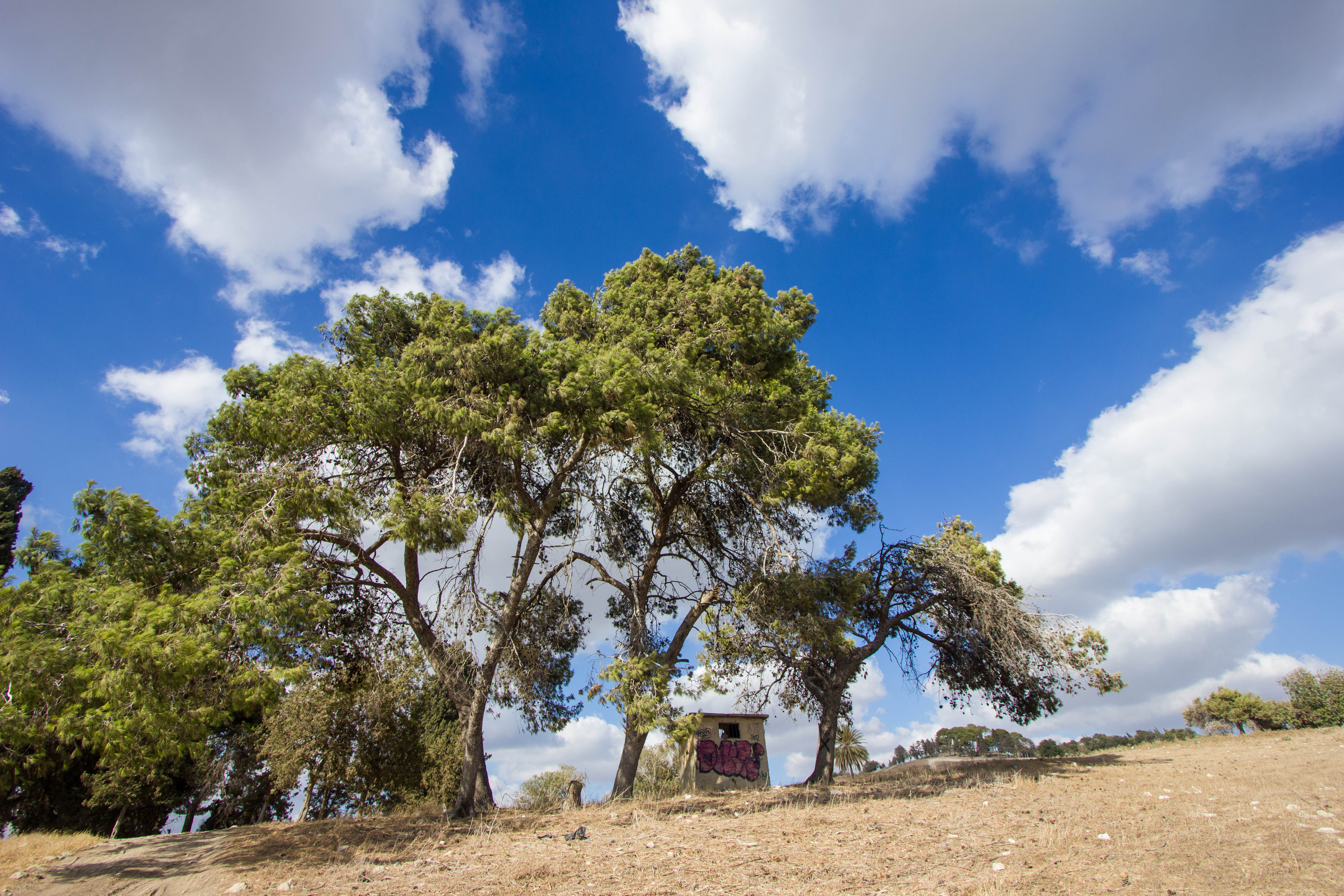 אחת הערים החשובות בצפון ארץ ישראל בעת העתיקה. היא נזכרת בתנ"ך בשם זה, ובתעודות מחוץ למקרא בשם שמע'ון. היא זוהתה בתל הקרוי בערבית "תל סַמוּנִיֶה", מתנשא כ-60 מ' מעל סביבתו, הצלע הצפון מזרחית של התל תלולה, והוא משתפל במתינות לכיוון דרום מערב. התל שוכן מצפון-מזרח למושב נהלל, בגבול עמק יזרעאל והגליל התחתון, ליד כביש הכניסה לתמרת.